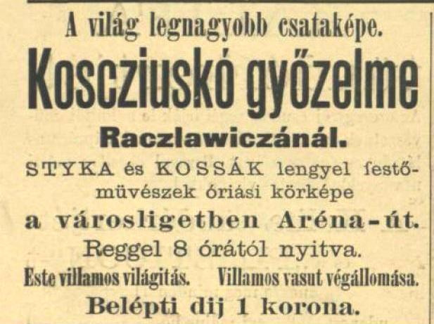 Millennium 1896. Lengyel körkép reklám.